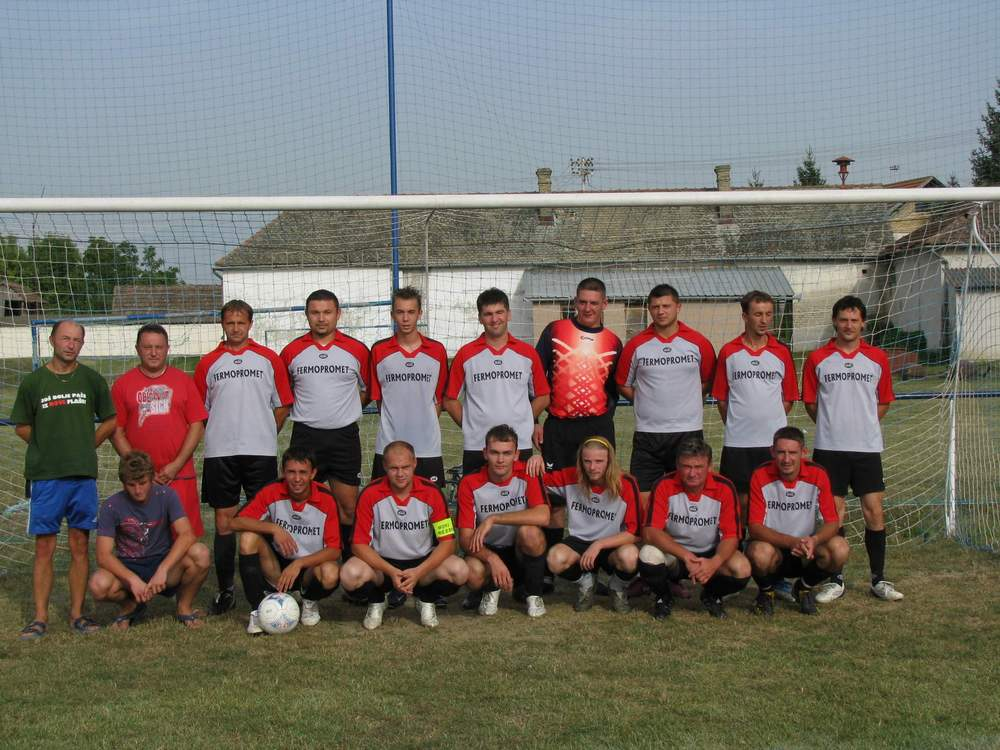 nogometni klub Športski Nogometni klub "Radnik" Novi Bezdan, Novi Bezdan